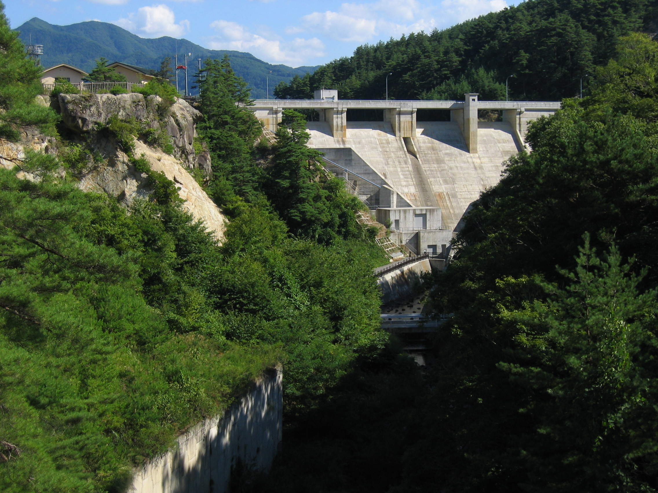 Onikuma Dam (小仁熊ダム) is a dam in Nagano, Japan.